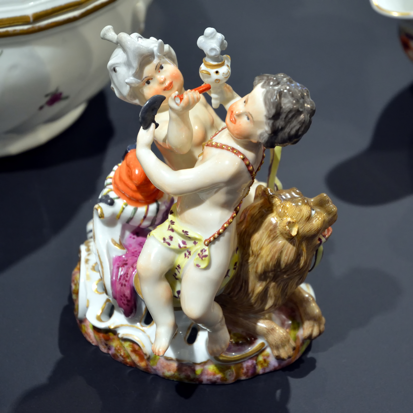 Impressionen vom Porzellanmuseum Schloss Fürstenberg Zwei Kindergruppen: "Die vier Theile der Welt" von Anton Carl Luplau